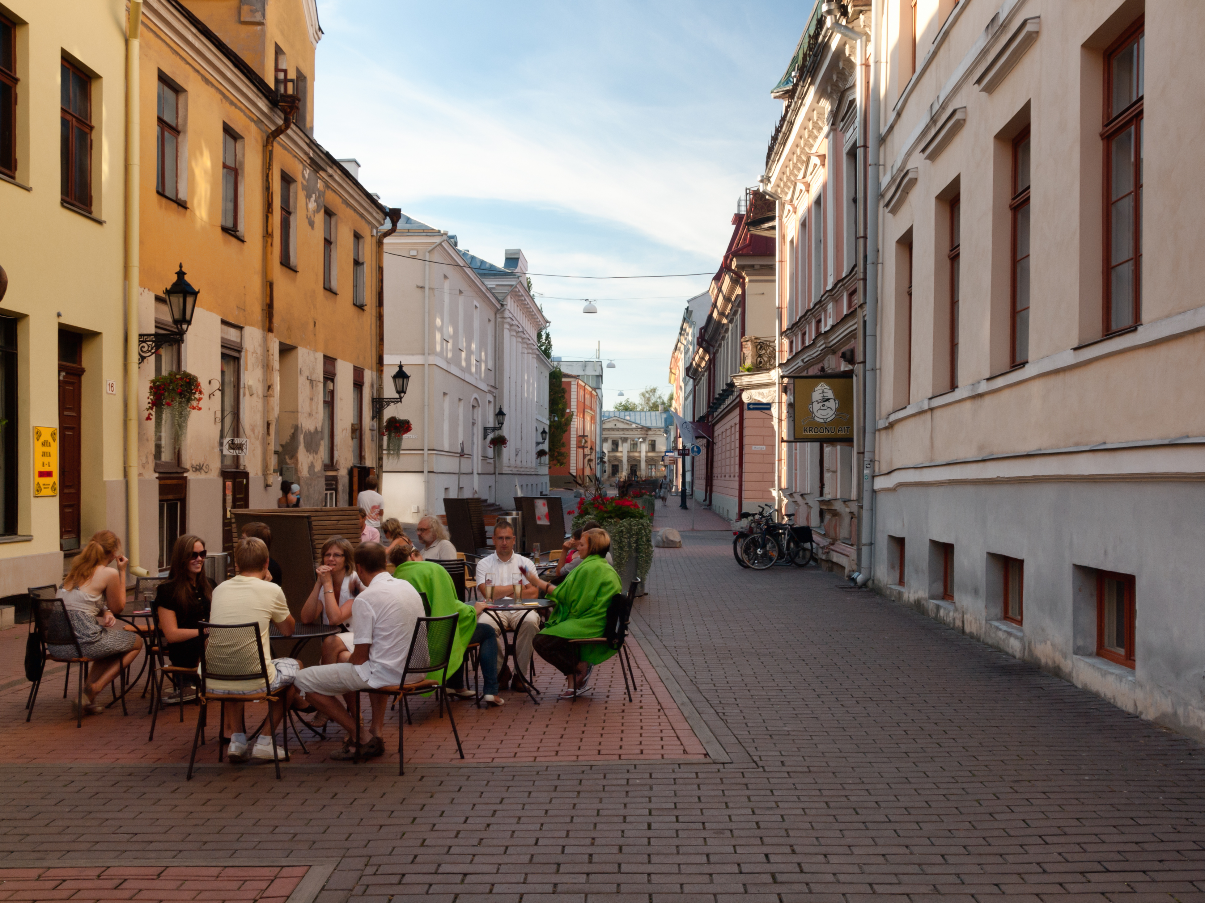 Rüütli street in Tartu.